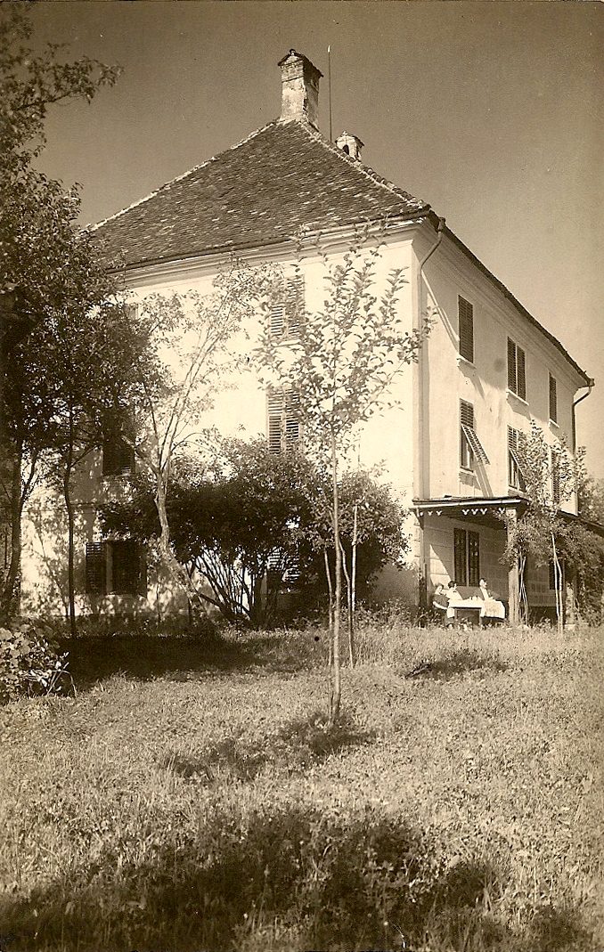 Dvorec Češnjice (Lichtenegg).